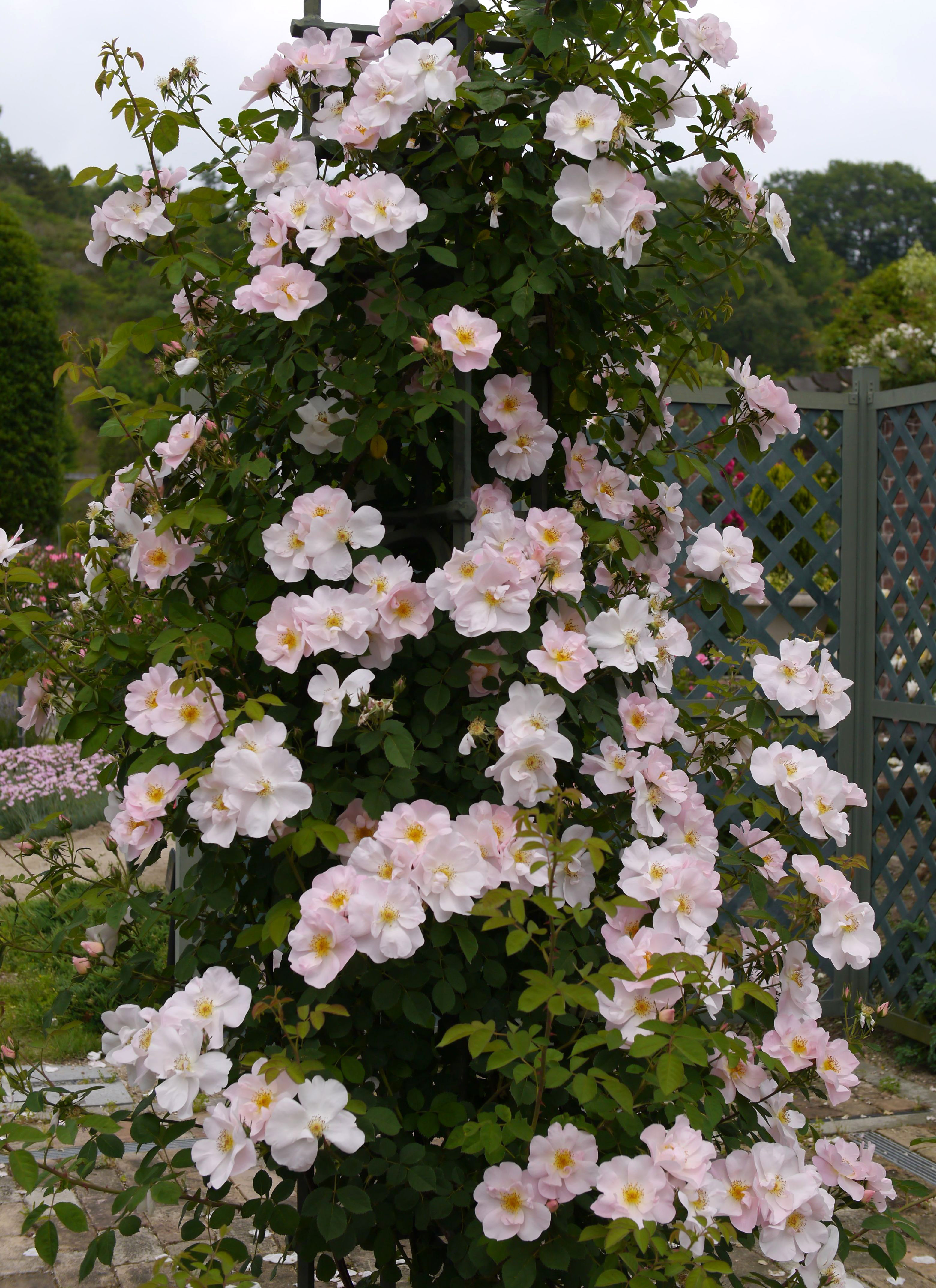 Rose, Shropshire Lass, バラ, シュロップシャー ラス, Shrub rose シュラブ United Kingdom イギリス Austin 1968